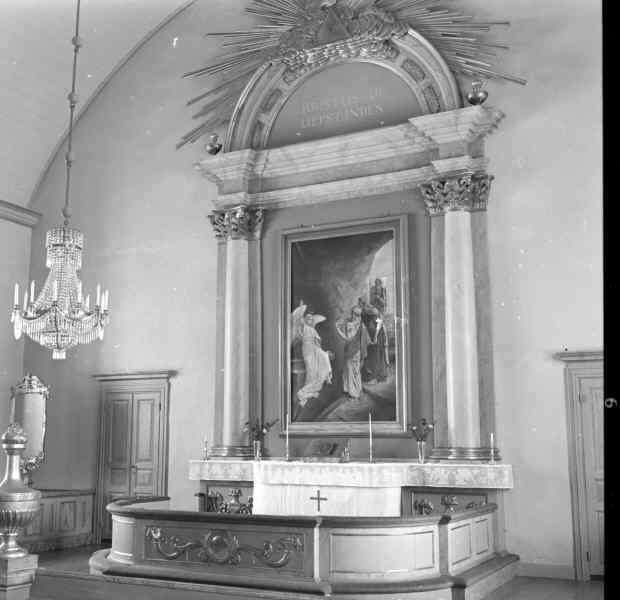 Koret med altaret. Kategori: (02) InteriörerKoret med altaret.